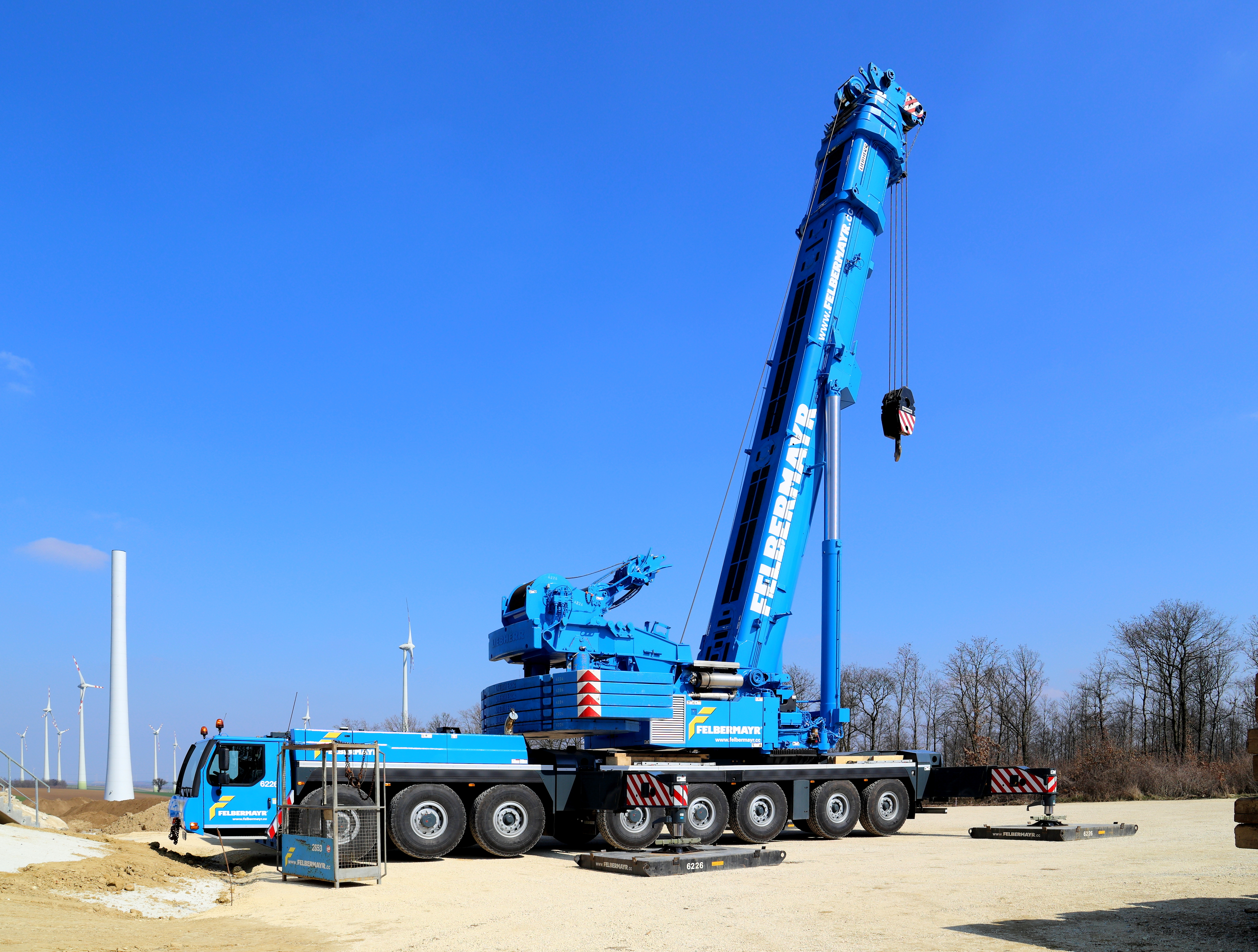 Ein Liebherr LTM 1500-8.1 Kran der Firma Felbermayr bei der Montage von Windkrafträdern im Weinviertel, Niederösterreich. Die max. Traglast des achtachsiegen All-Terrain-Kranes mit der Werksnummer 095296 (Bj. 2015) beträgt 500 Tonnen. Der Fahrmotor hat eine Leistung von 500 kW und der Kranmotor von 240 kW. Weitere Daten: 84m langer, 7-teiliger Teleskopausleger und Gitterspitze bis zu 91m Länge; 96 t Einsatzgewicht.